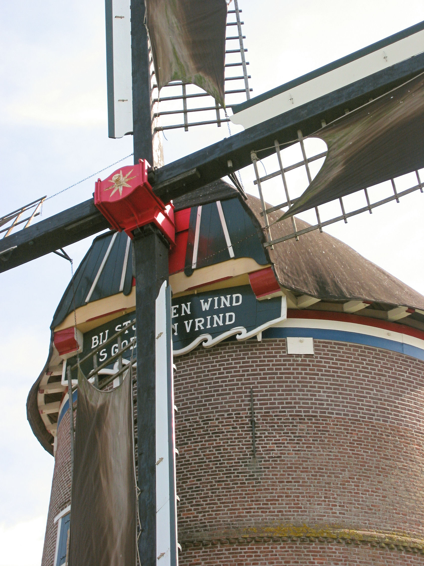 Molen De Zwaan baard, Lienden, Gelderland, the Netherlands